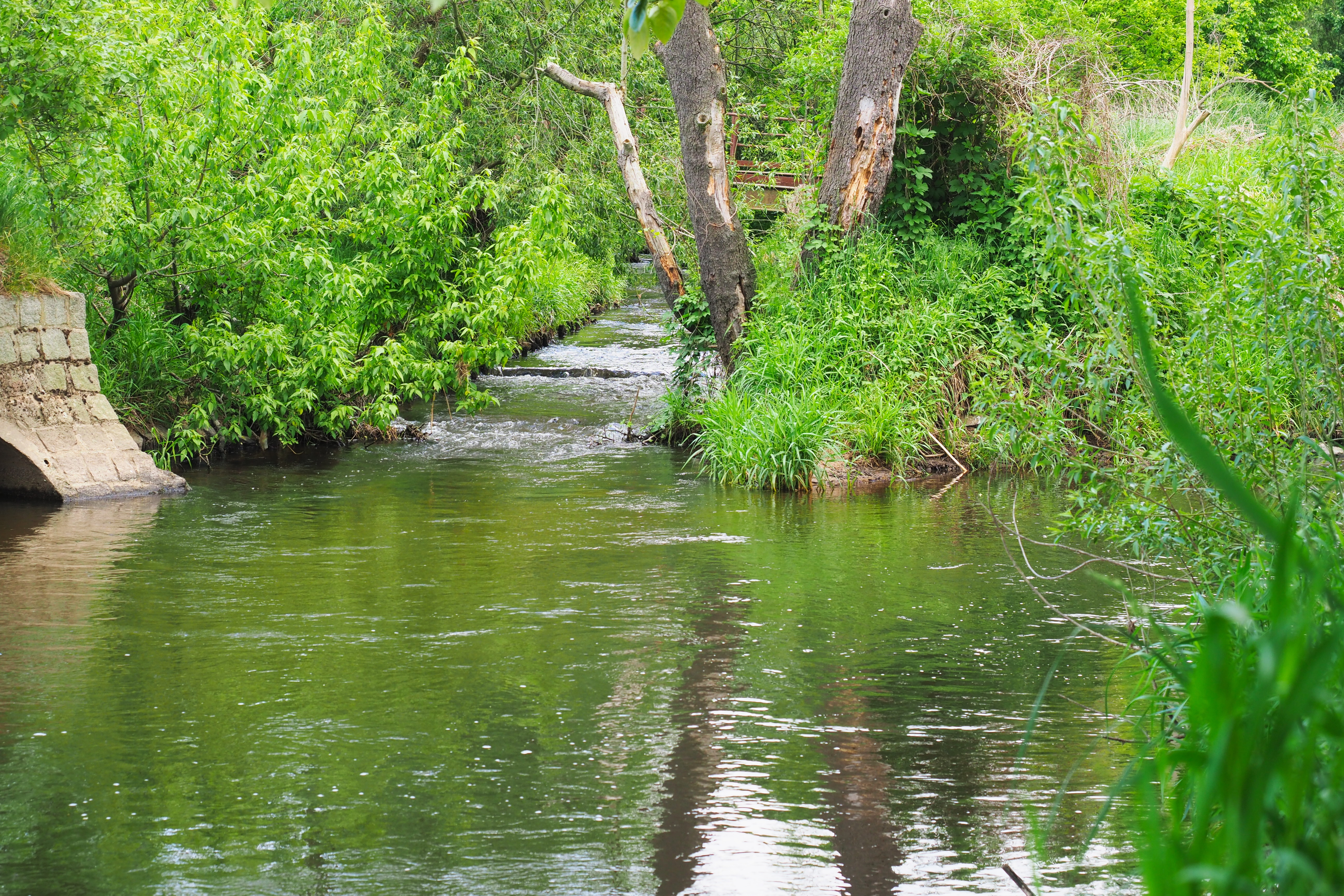 Mündung der Kleinen Röder in die Große Röder bei Ottendorf-Okrilla